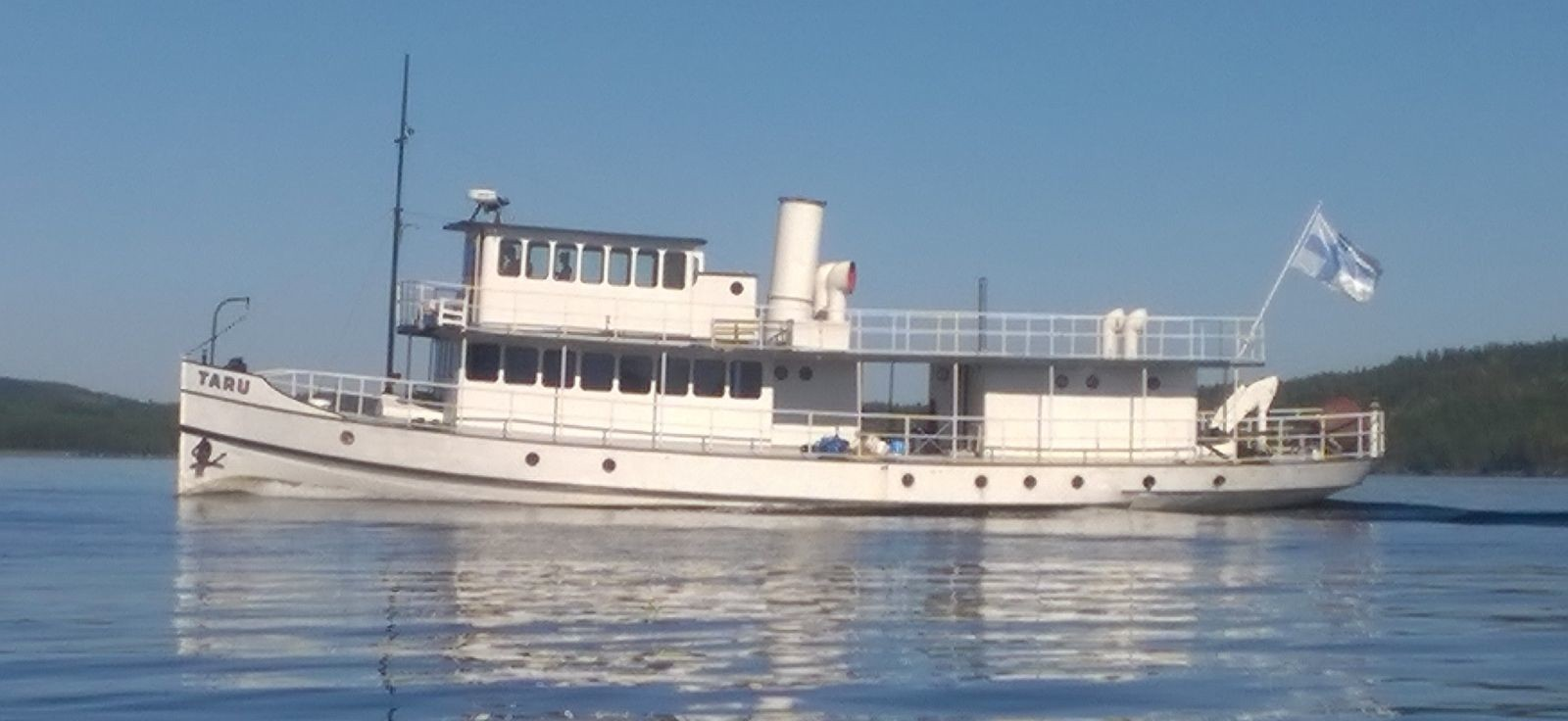 M/S Taru elokuussa 2015